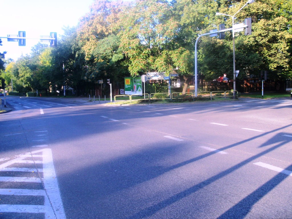 skrzyżowanie ul. Piotrowickiej i ul. Panewnickiej w Katowicach